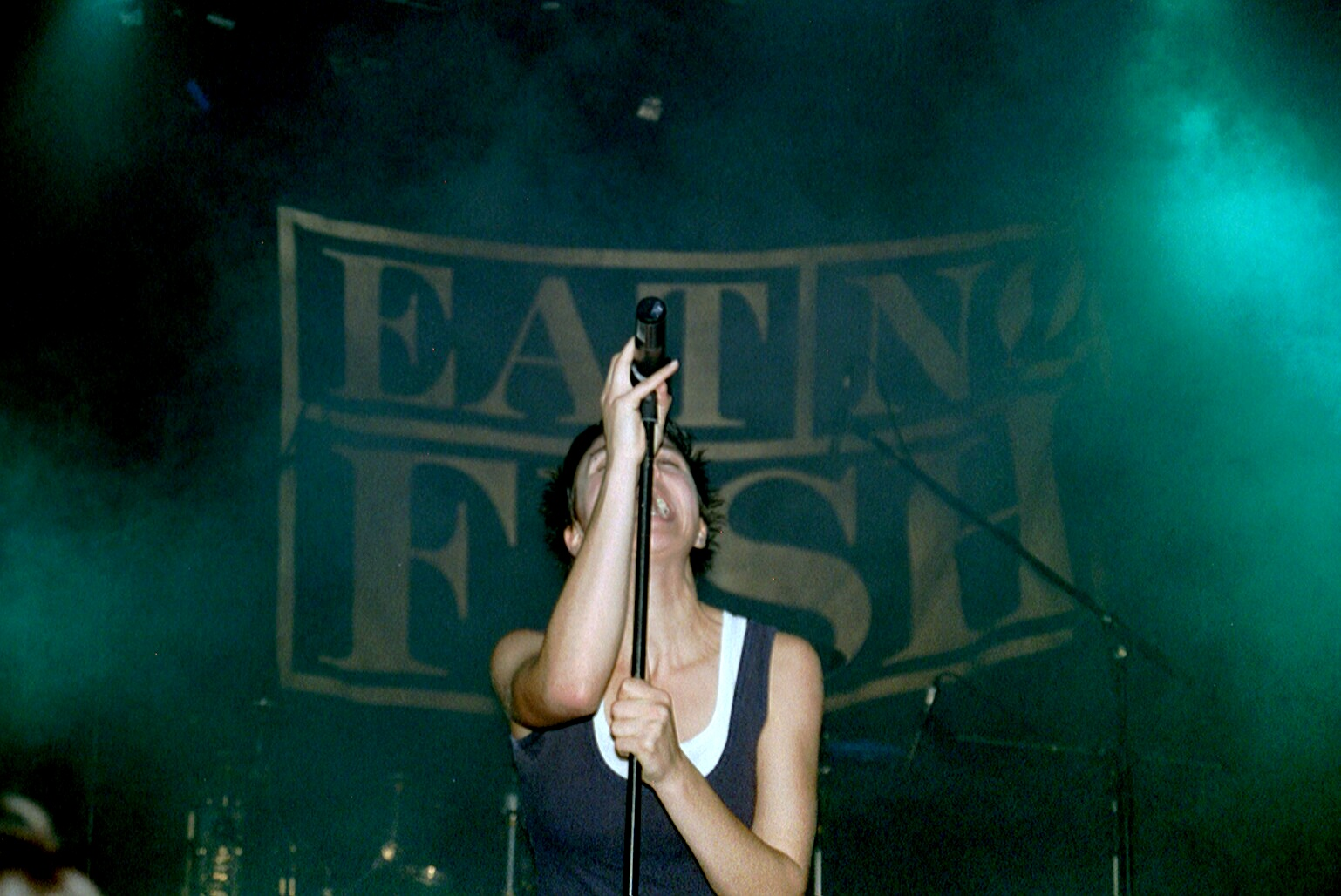 Eat No Fish Sängerin Maria Koch in Aktion